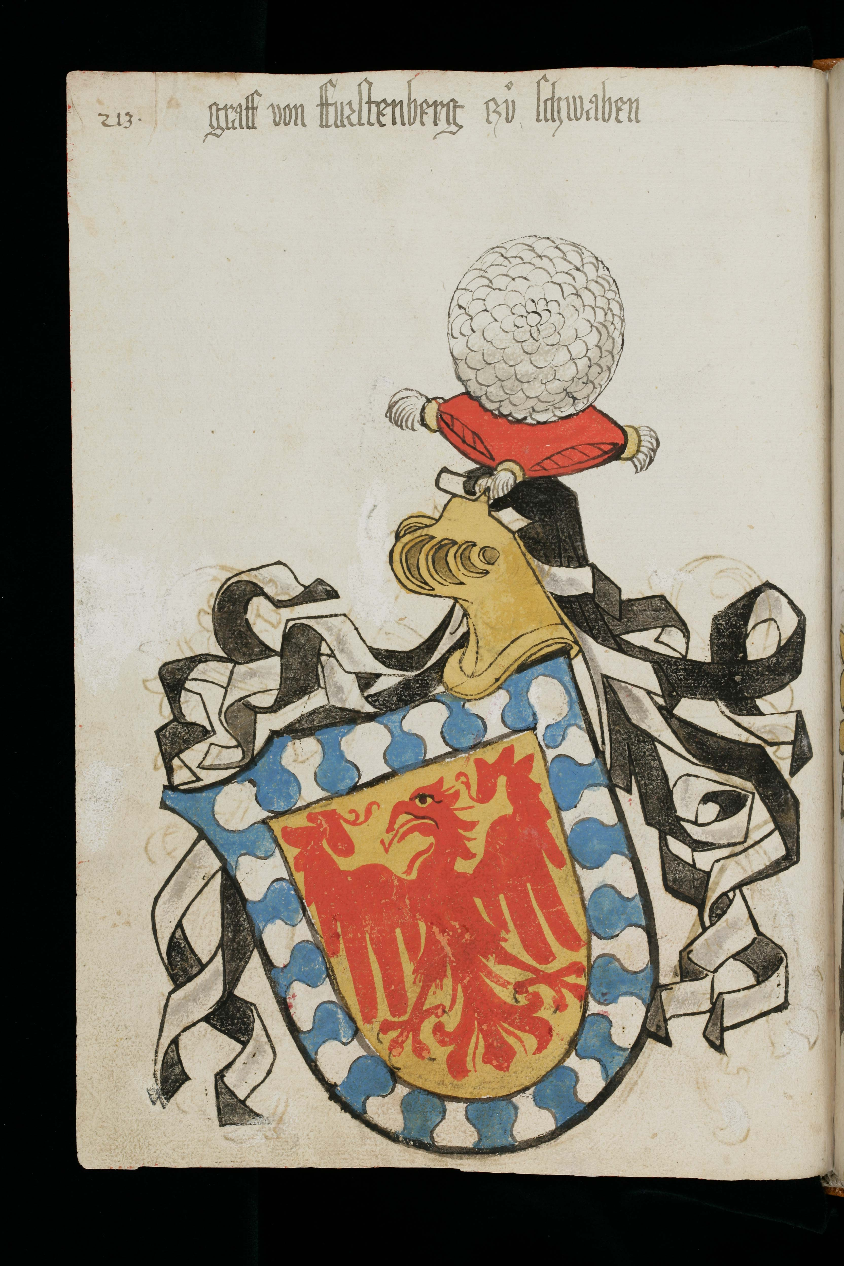 Wappenbuch des St. Galler Abtes Ulrich Rösch; Stiftsbibliothek St. Gallen, Cod. sang. 1084 Wappen: Fürstenberg